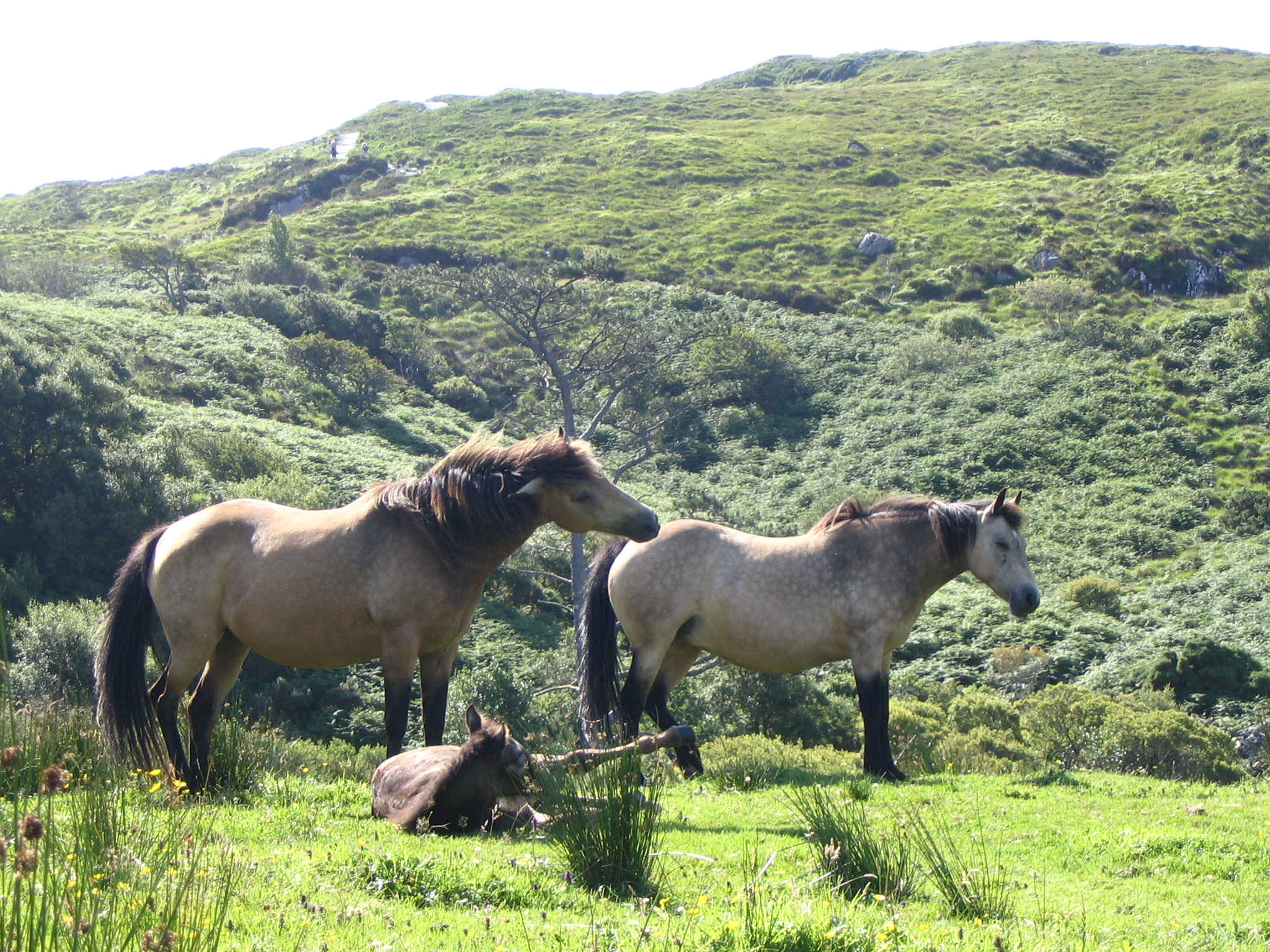 Clement le coiffeur